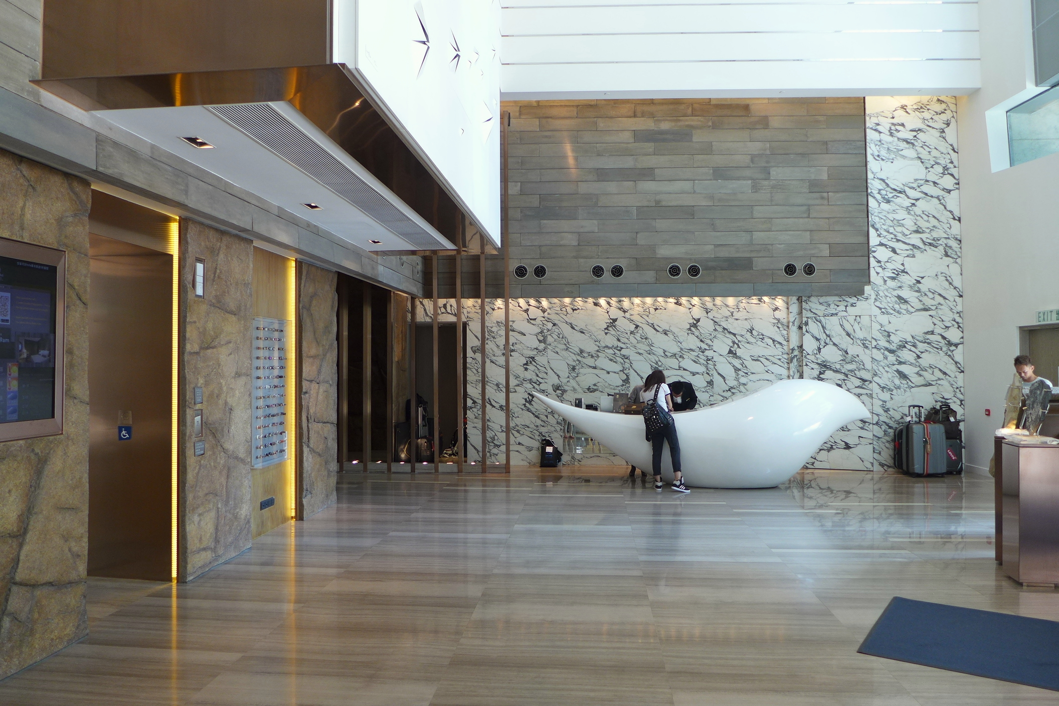 L'hotel élan GF lobby